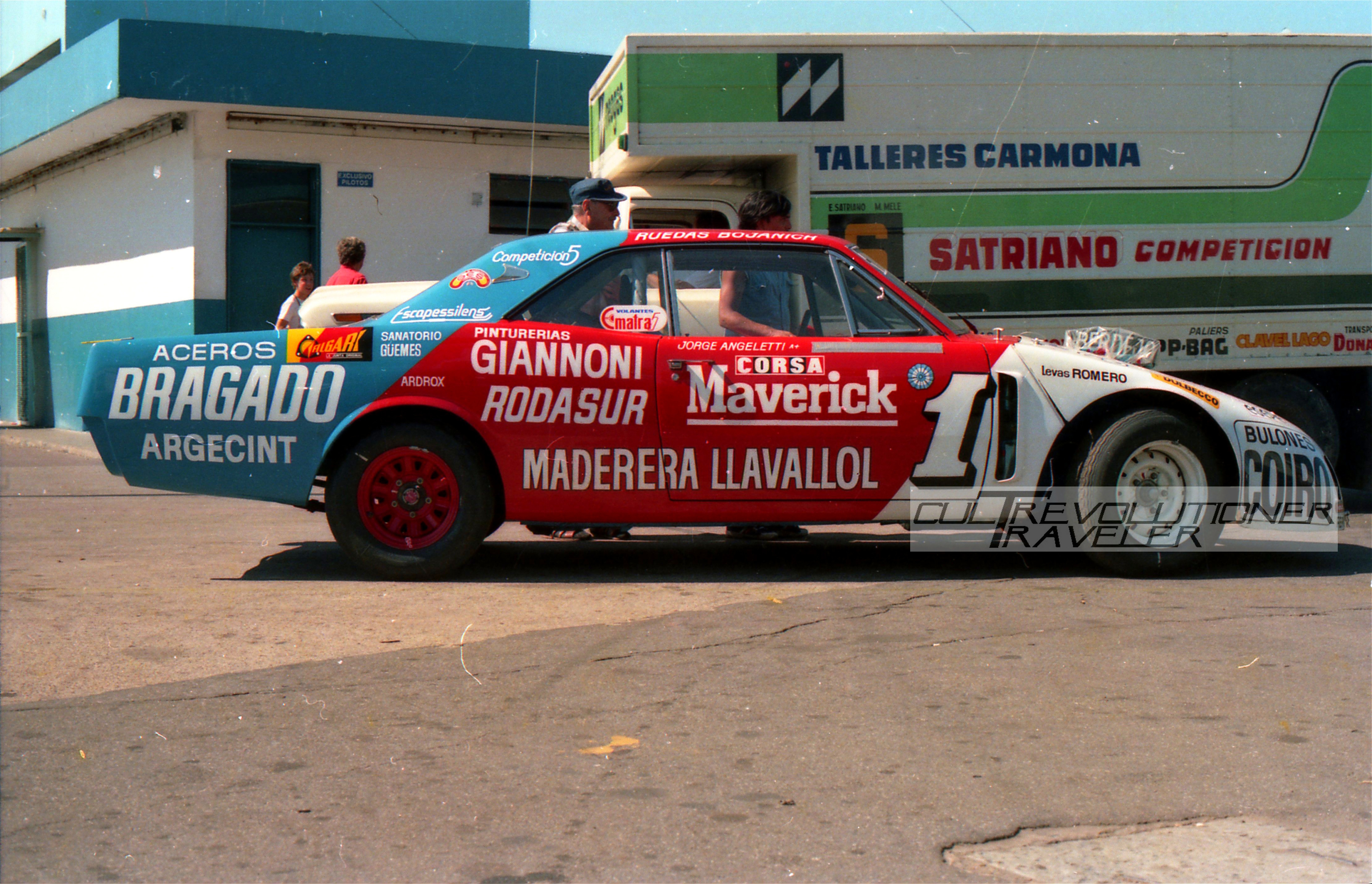 la dodge #1 campeona del año 1986 en el patio de boxes del autodromo de buenos aires